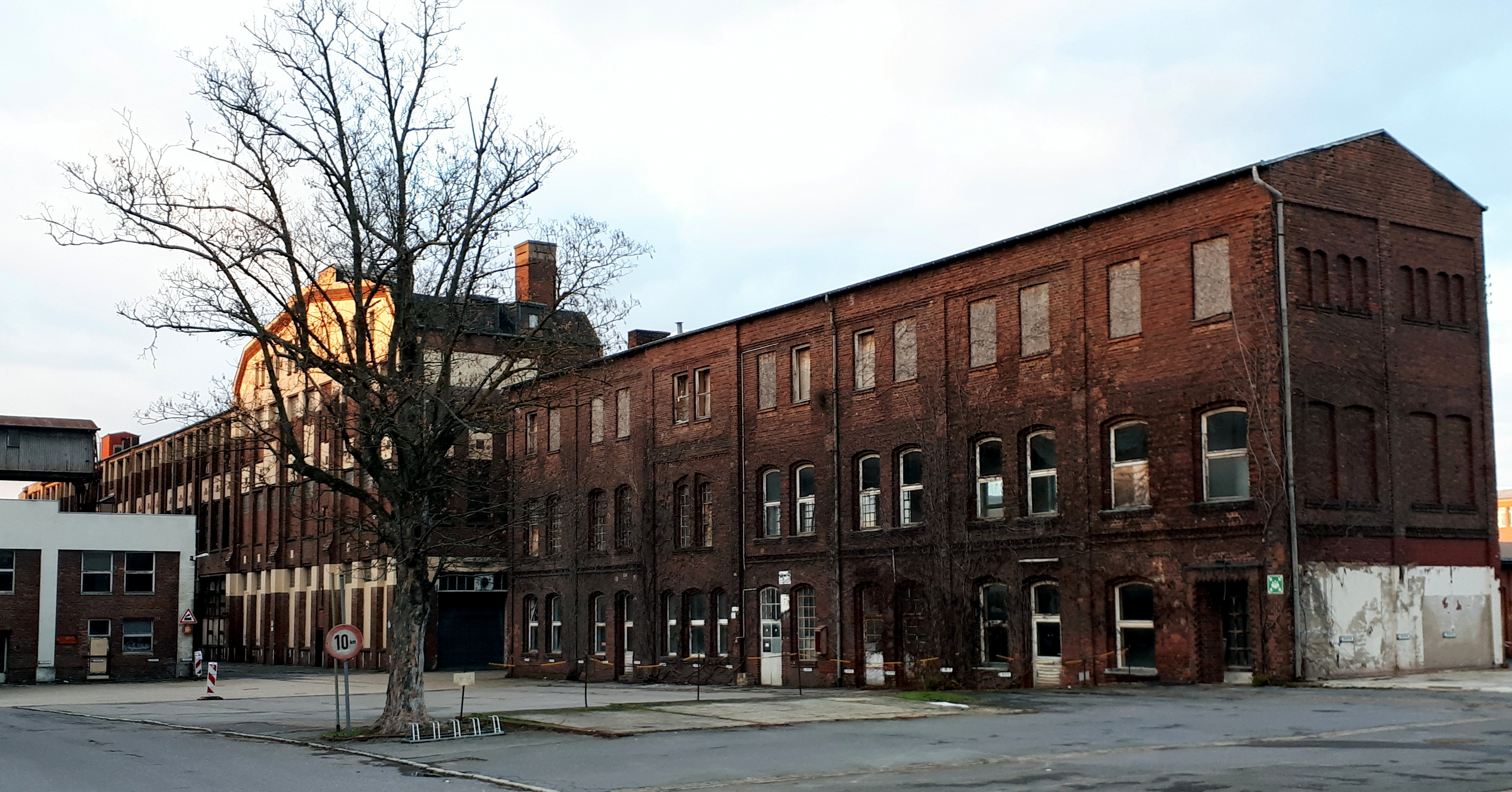 Werkstattbau Süd der ehem. Elektrotechnik-Fabrik Garbe, Lahmeyer und Cie. in Aachen